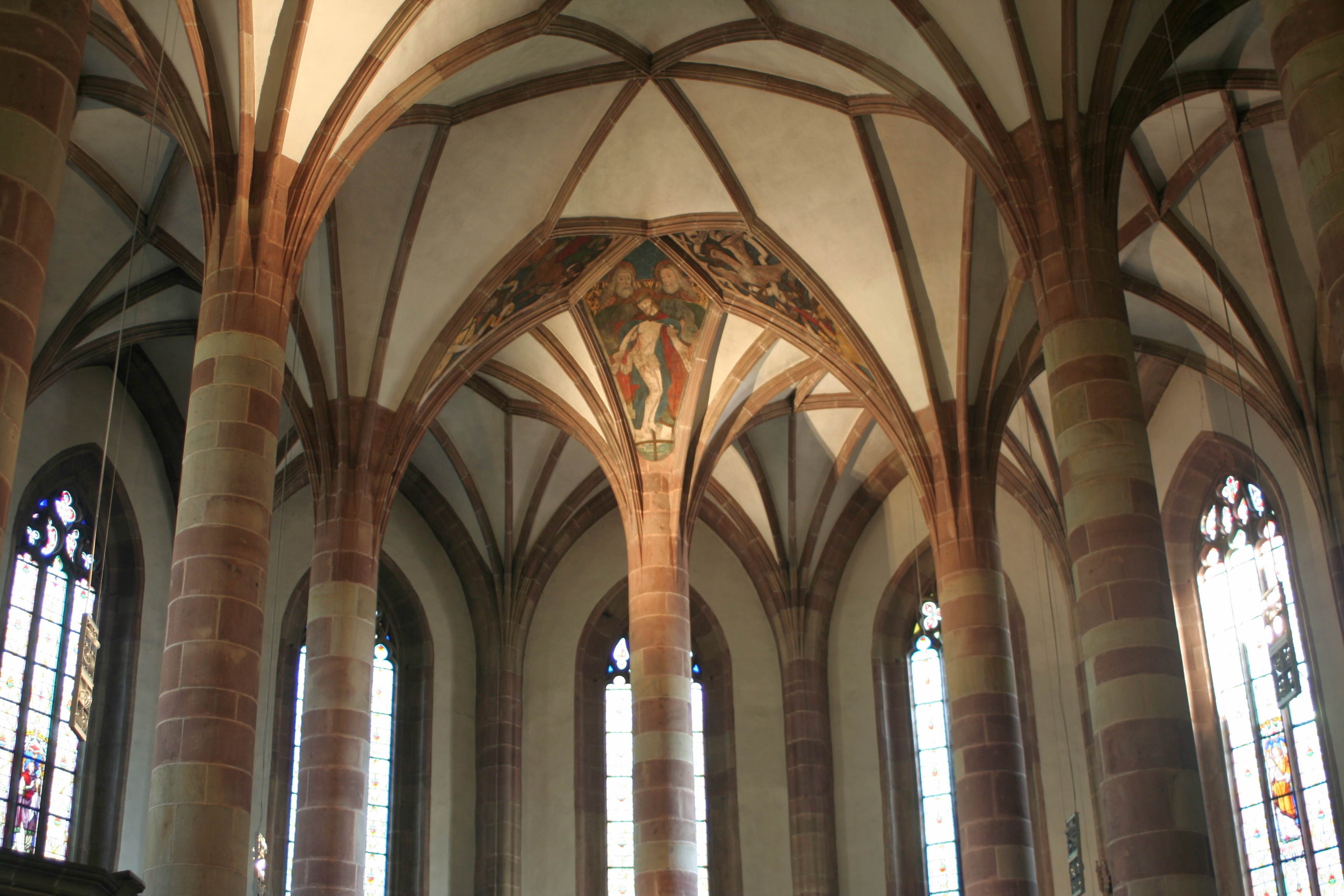 Spitalkirche zum Heiligen Geist in Meran